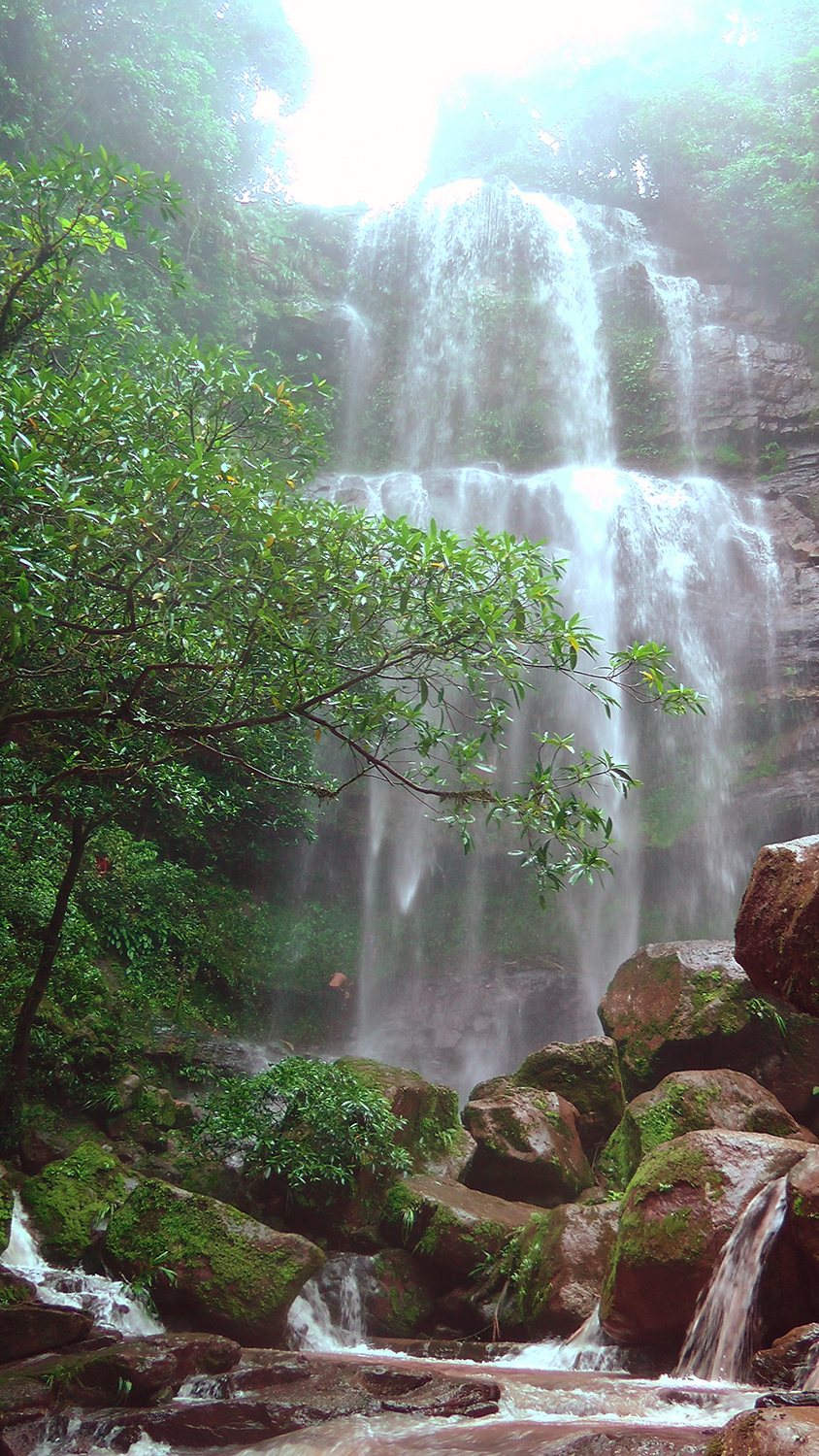 LA CATARATA DE LOS JARDINES